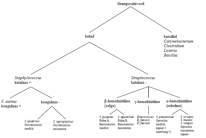 Liikide identifikatsiooni hierarhia.